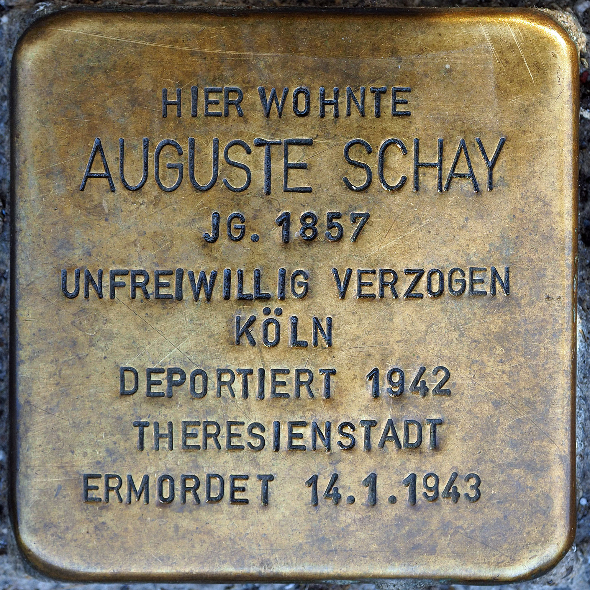 Stolpersteine Wesel: Schay, Auguste